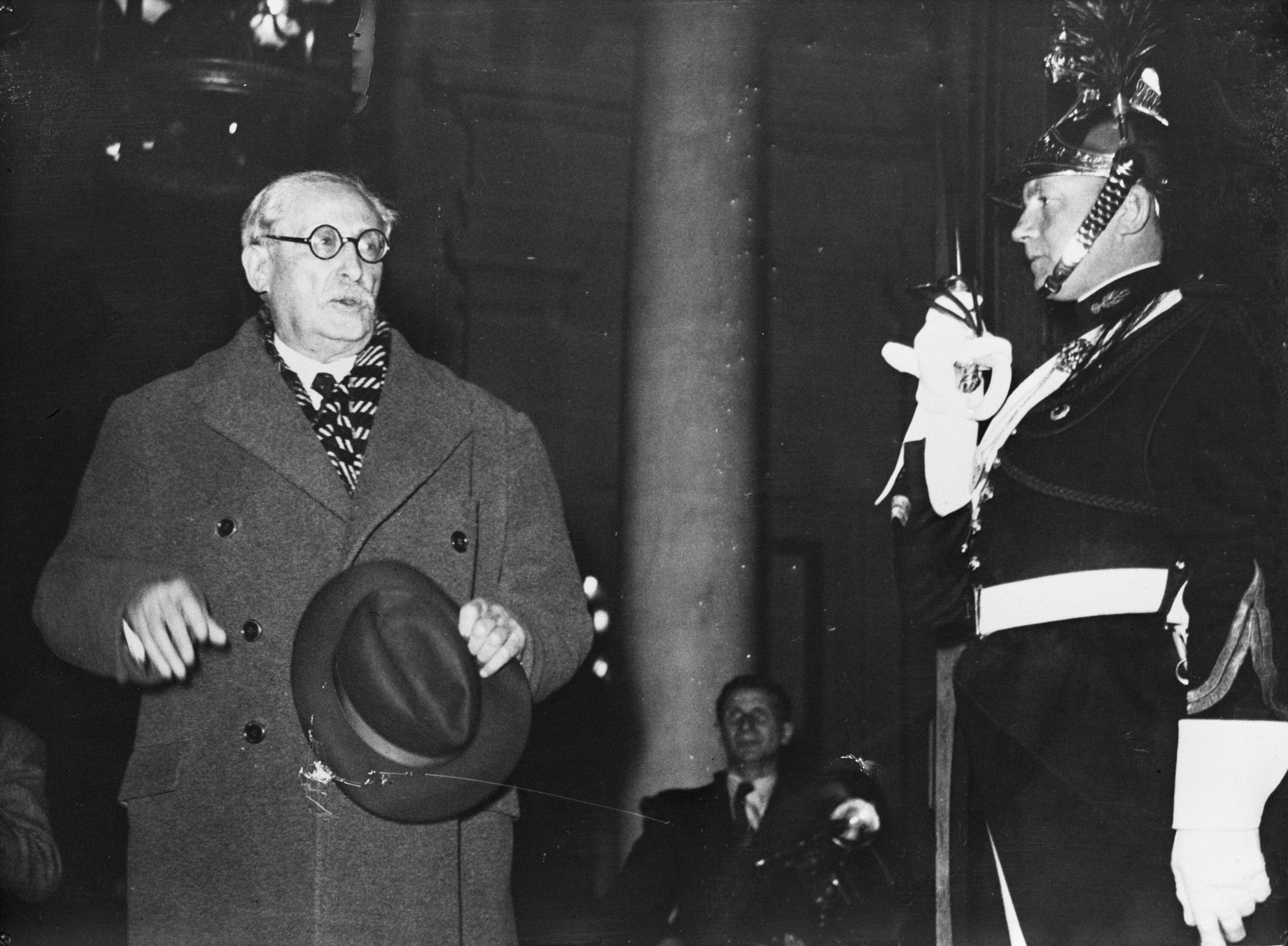 Collectie / Archief : Fotocollectie Anefo Reportage / Serie : [ onbekend ] Beschrijving : Leon Blum, Franse premier, houdt nieuwjaarsvisite bij de Franse president Datum : 2 januari 1947 Locatie : Frankrijk, Parijs Trefwoorden : bezoeken, nieuwjaar, premiers, regeringen Persoonsnaam : Blum Léon Fotograaf : Agence France Presse (AFP) Auteursrechthebbende : Nationaal Archief Materiaalsoort : Glasnegatief Nummer archiefinventaris : bekijk toegang 2.24.01.09 Bestanddeelnummer : 901-9813